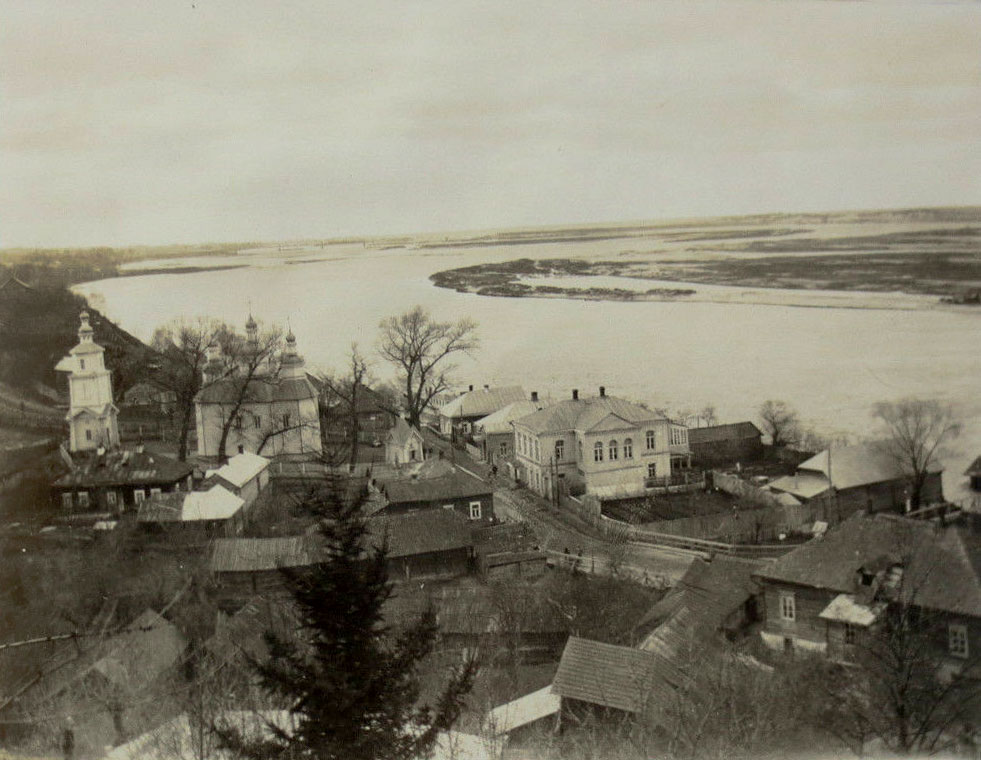 Беларуская (тарашкевіца): Мазыр (Mazyr), вуліца Пятніцкая (vulica Piatnickaja). Царква Сьвятой Параскевы Пятніцы